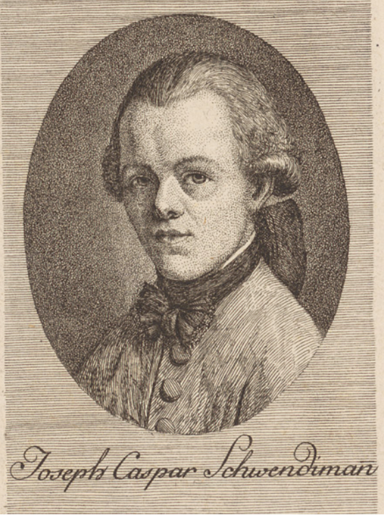 Porträt Schwendimanns